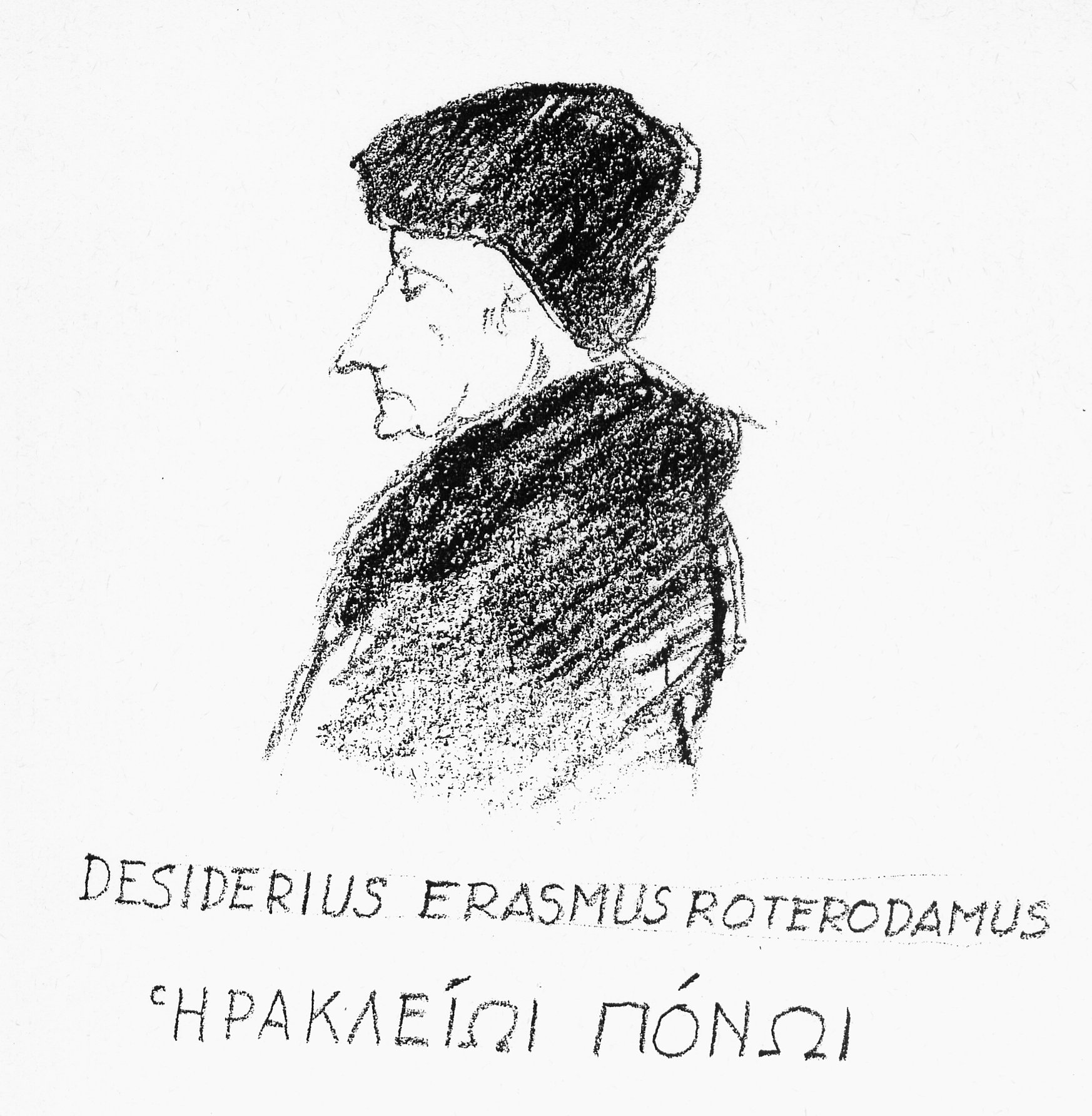 ERASME